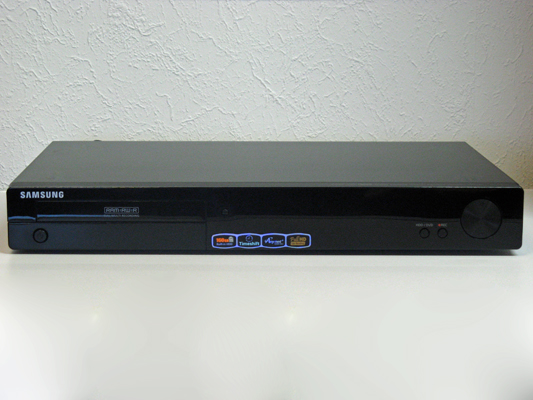 DVD Recorder Samsung DD-HR773